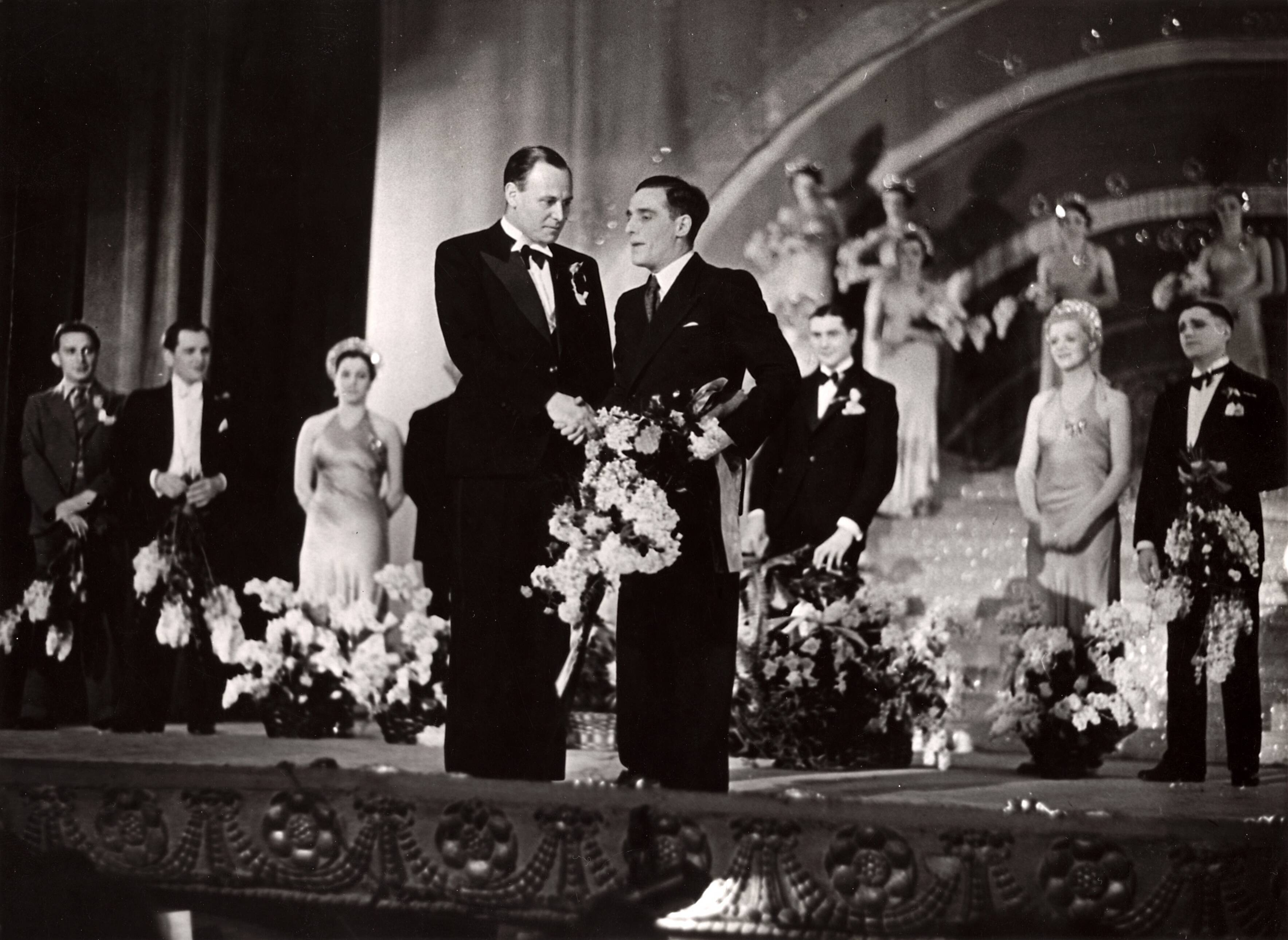 Aanloop naar de Tweede Wereldoorlog. Personen op naam. Revues. Ter gelegenheid van de 100ste opvoering van de revue "Hoe maller hoe mooier" poseren de auteur Jacques van Tol en de acteur Louis Davids voor alle medespelers. Nederland, plaats onbekend, 3 januari 1936.